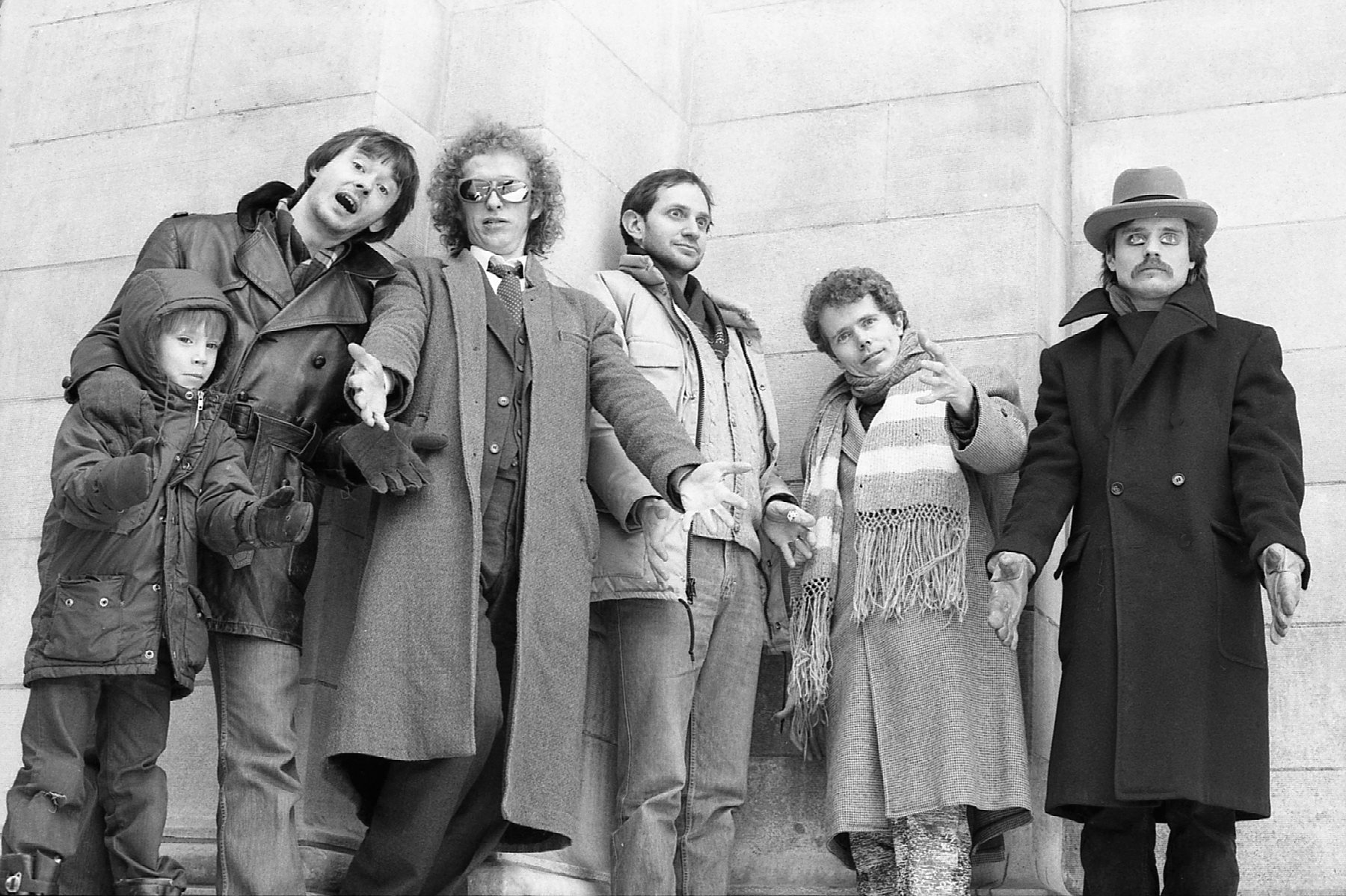 Pukka Orchestra